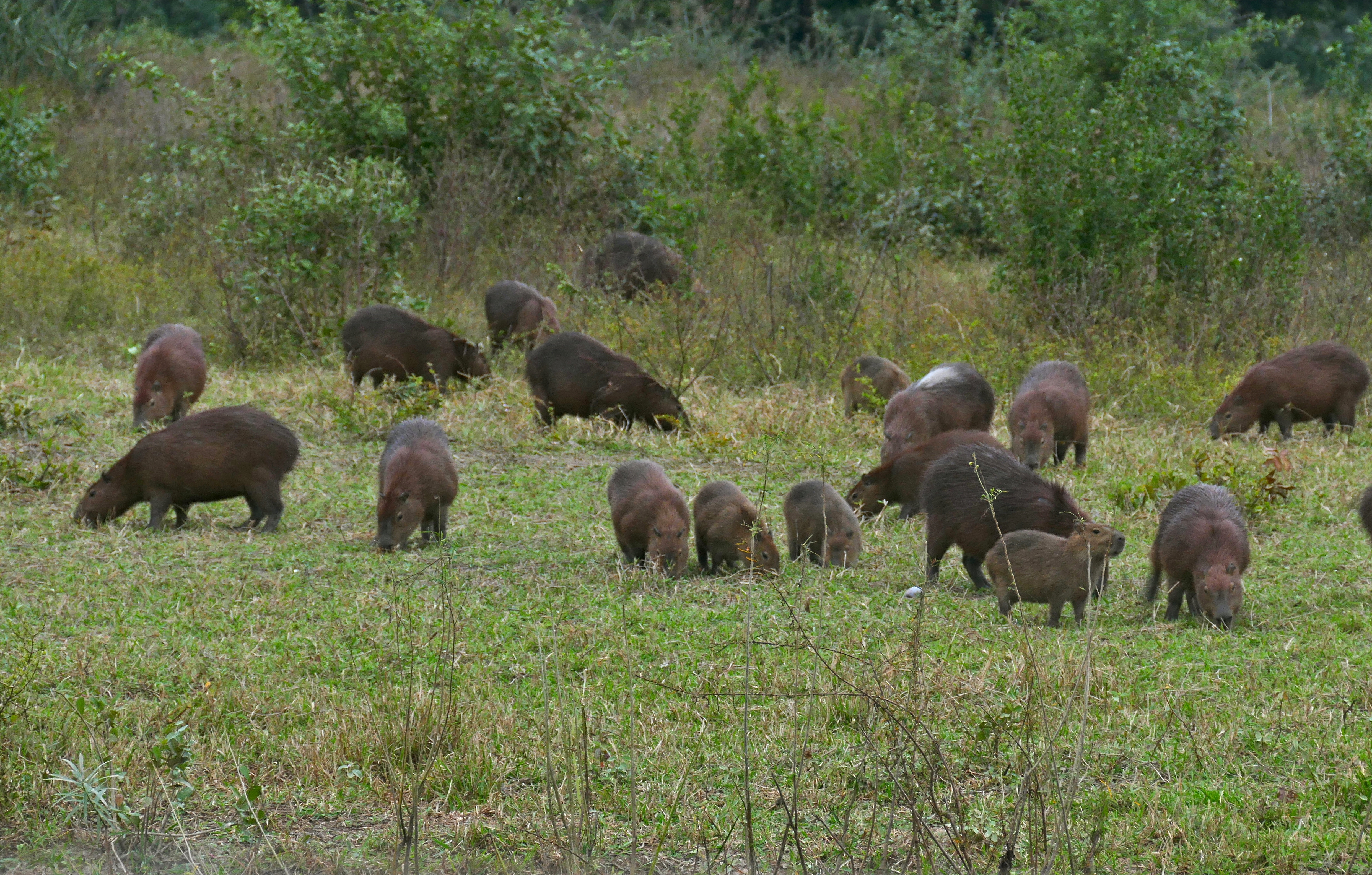 Transpantaneira, Poconé, Mato Grosso, BRAZIL